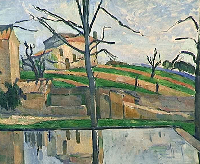 Dortmund, Museum für Kunst- und Kulturgeschichte, Ausstellung Cézanne Manet Schuch: Drei Wege zur autonomen Kunst (30.05.2000 - 30.07.2000)